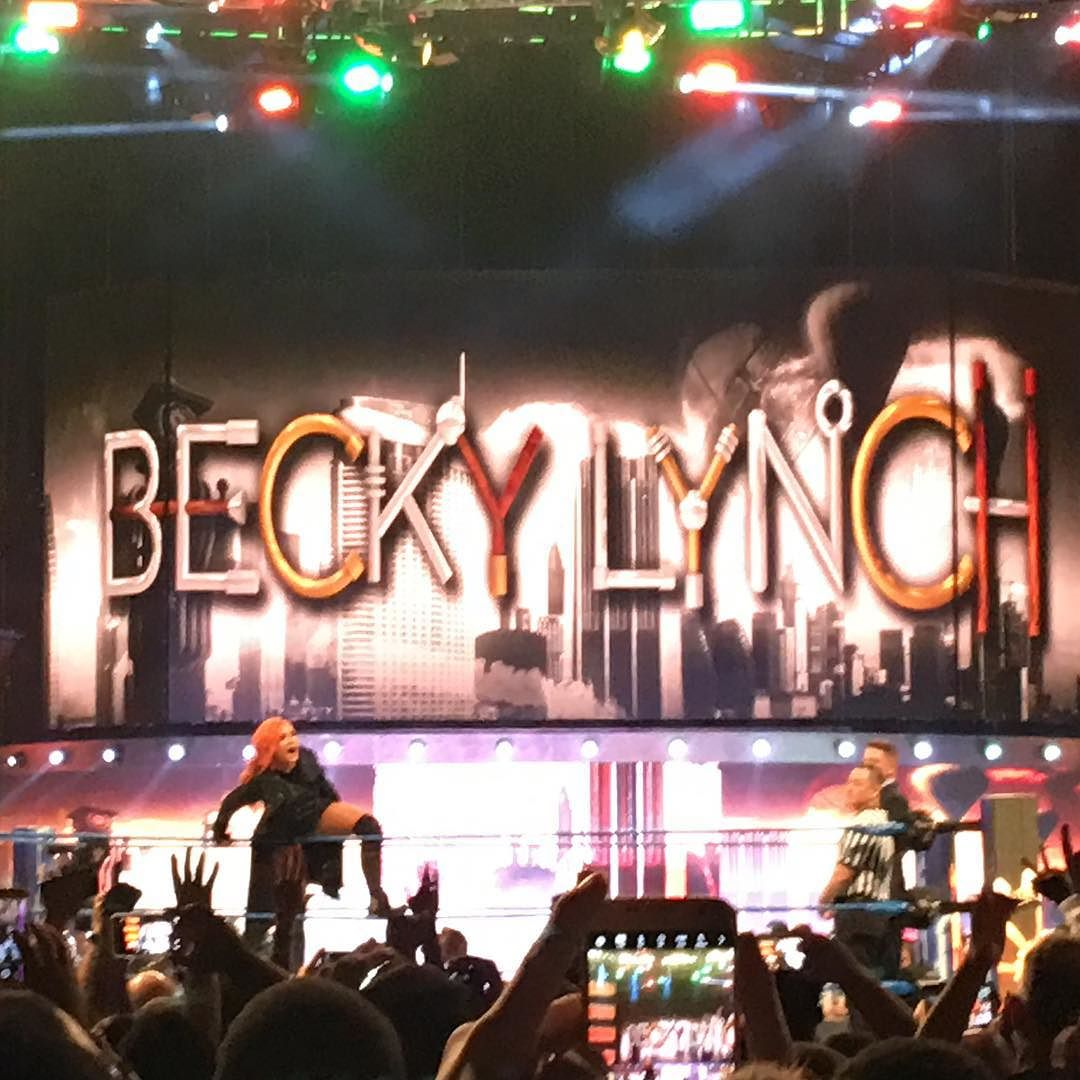 via Instagram ift.tt/2iBDYlY